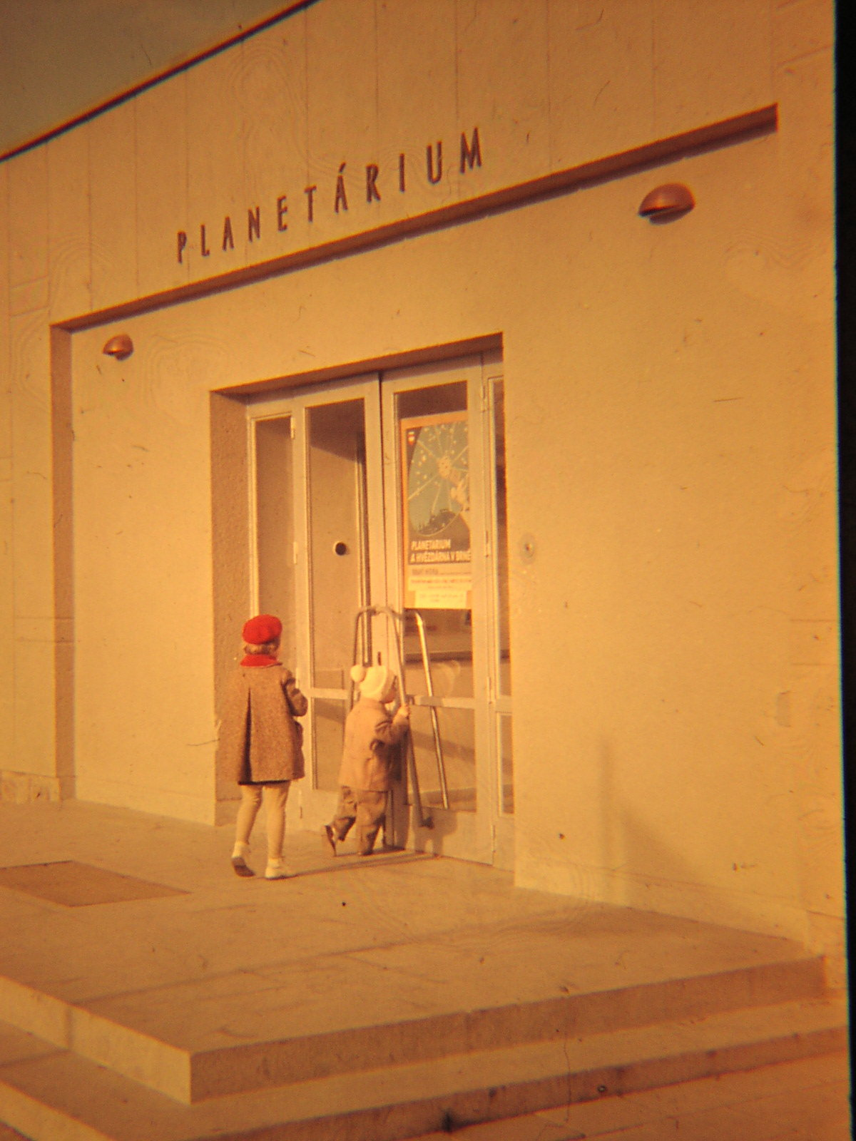 Planetárium Brno, po roce 1960